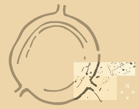 Sonnenobservatorium von Goseck. Aufsicht mit Hervorhebung der Ausgrabungen von 2002 und 2003. Eigene Zeichnung auf Basis von Plänen des Instituts für Prähistorische Archäologie Martin-Luther-Universität Halle-Wittenberg